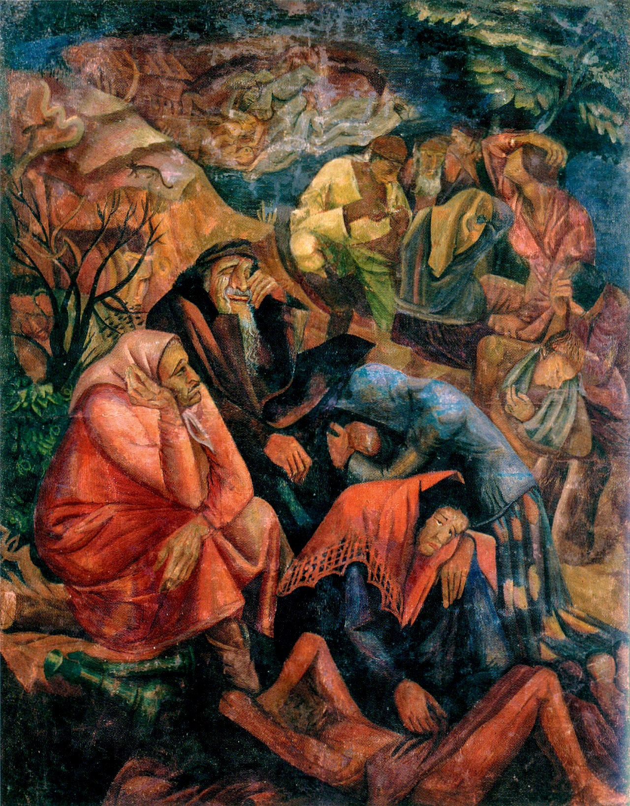 Мануил Шехтман, "Погромленные" (1927)